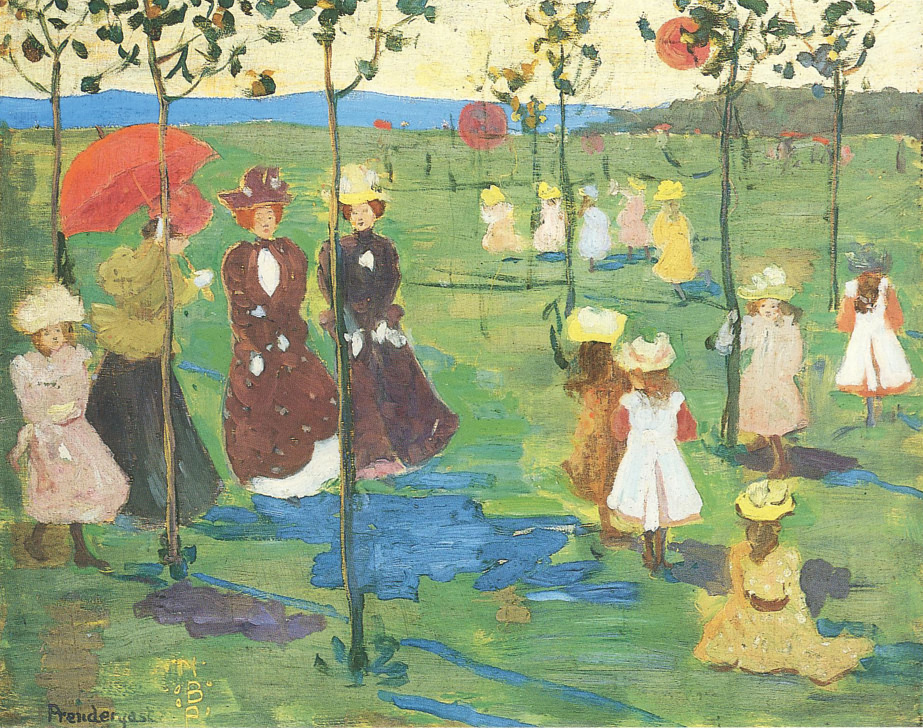 Painting Franklin Park, Boston